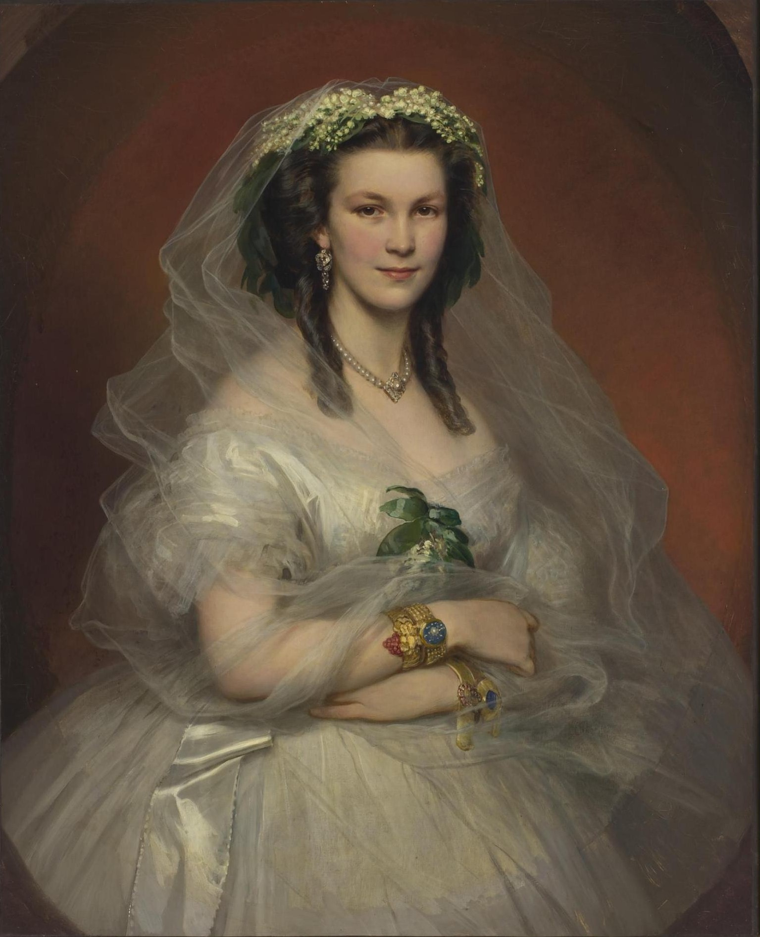 Портрет неизвестной. Графиня Софья Илларионовна Строганова, ур. Васильчикова (14.02.1841—30.06.1871)?